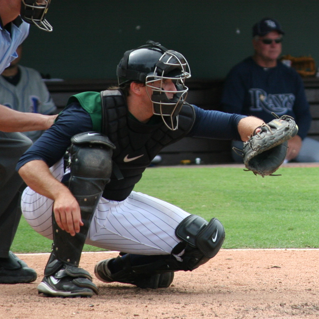 Donny Lucy